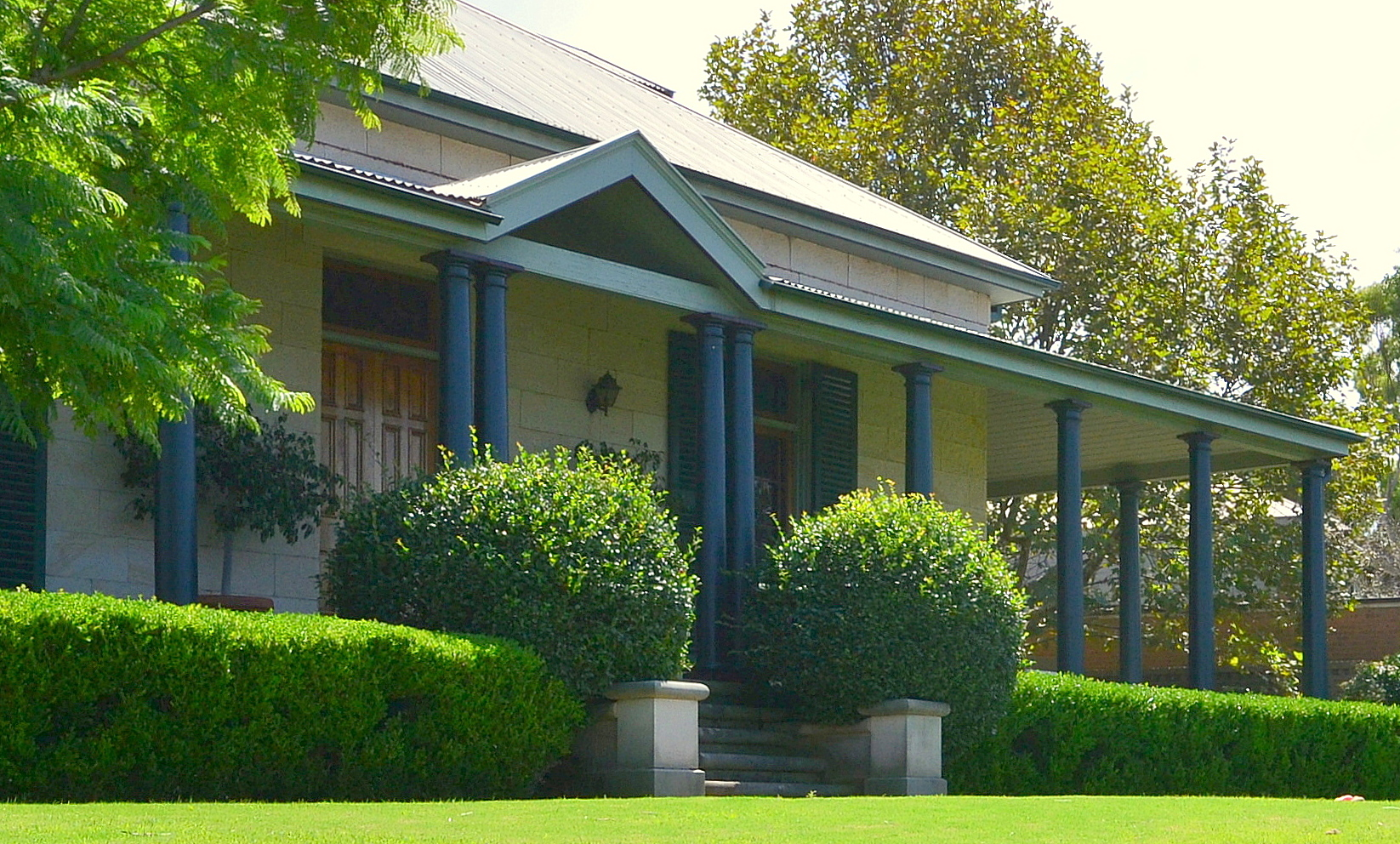 Hampton Villa, Balmain, Sydney